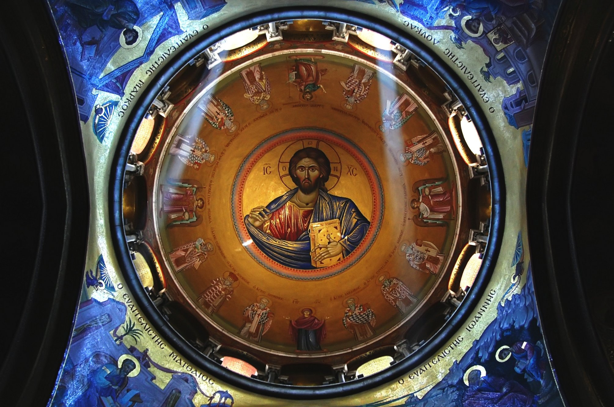 Interior de la cúpula del Santo Sepulcro (Jerusalén).